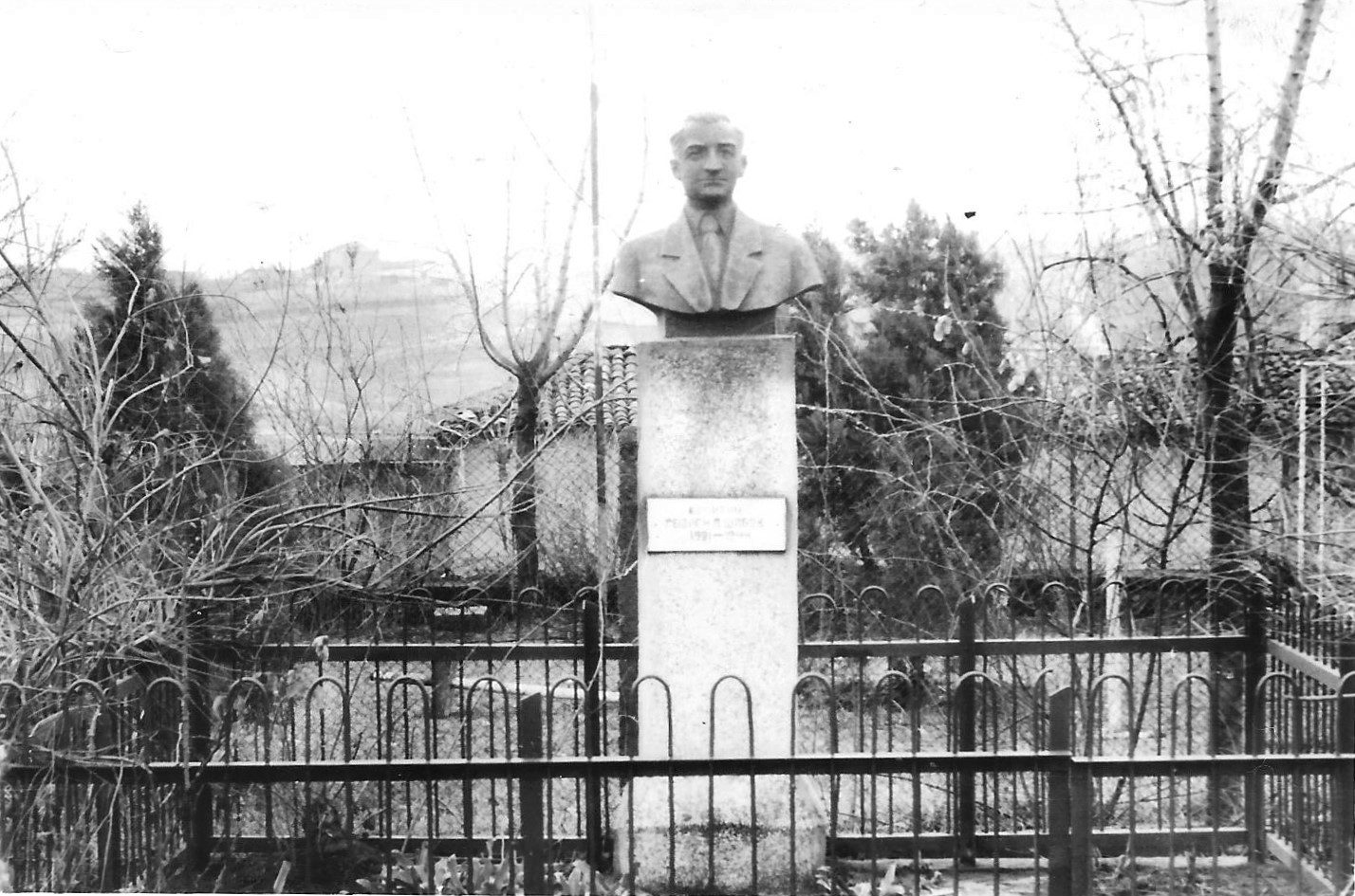 Бивш паметник на Георги Шабов в двора на "ОУ Х.Димитър и Ст.Караджа", с.Караисен